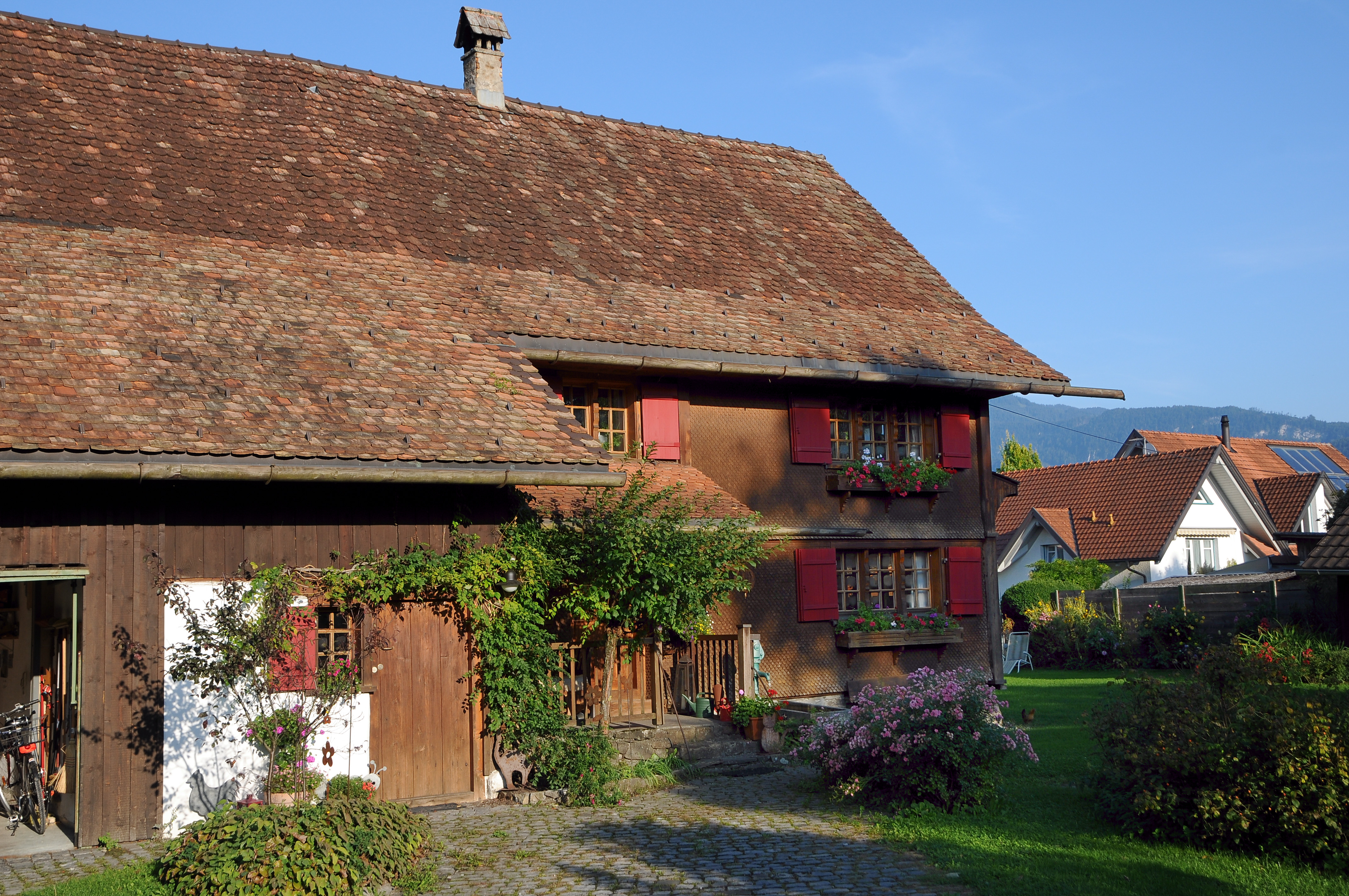 Bauernhaus, Rheintalhaus an der Reichshofstraße 1 in Mäder, Vorarlberg